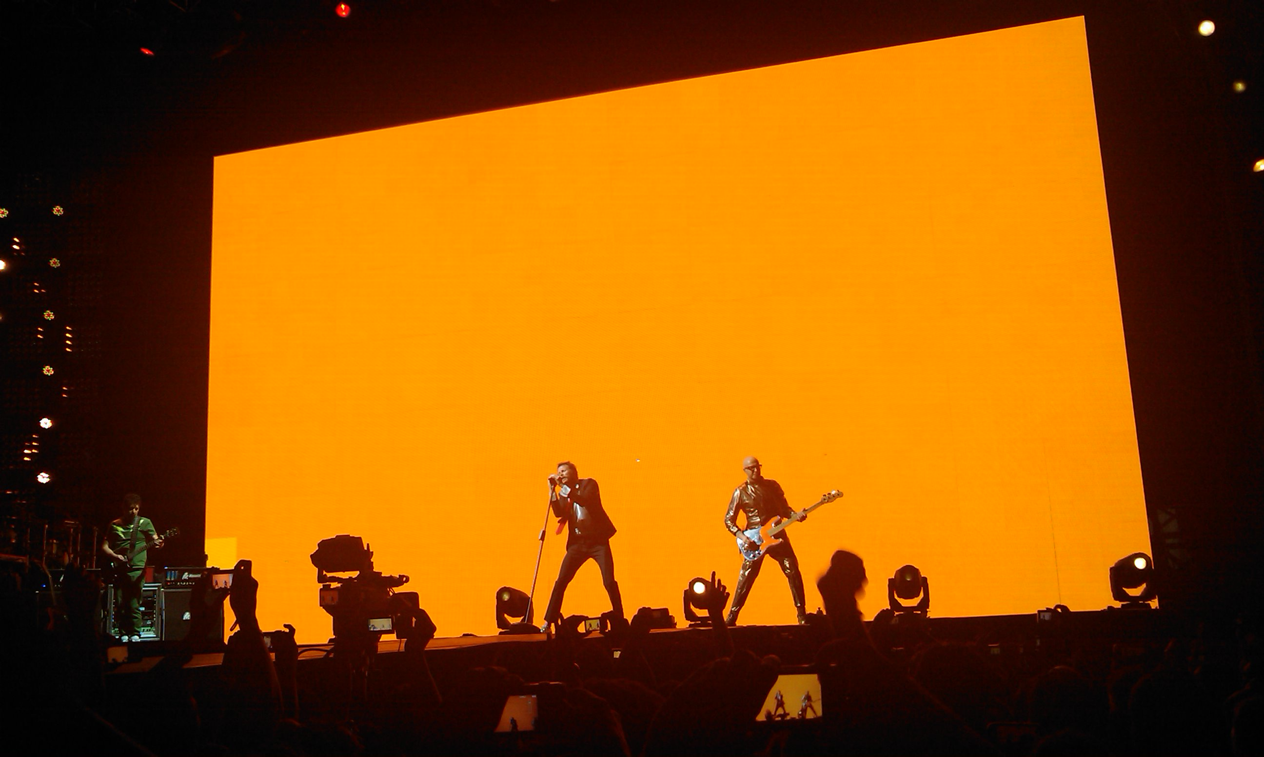 Jovanotti con il bassista Saturnino Celani nel suo concerto nello Stadio della Vittoria a Bari il 29 giugno 2011